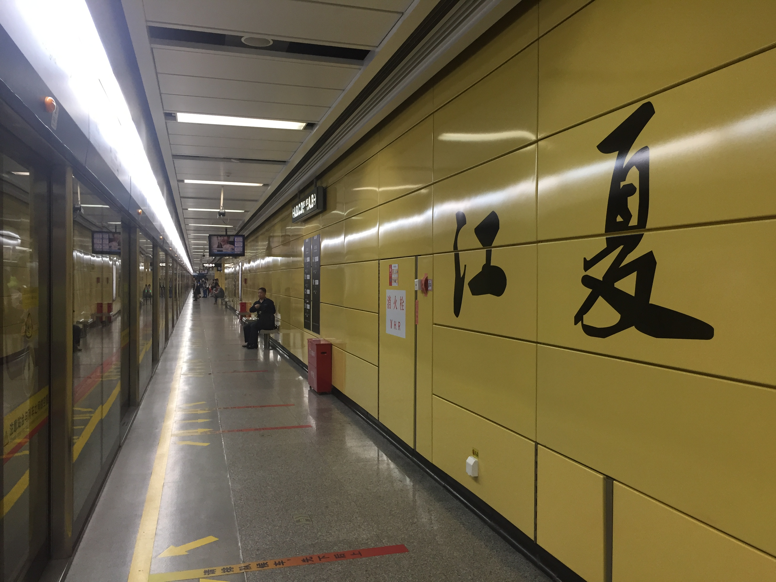 广州地铁江夏站